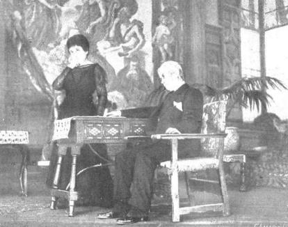 María Guerrero y José Santiago en una escena de la obra de teatro Campo de armiño, de Jacinto Benavente